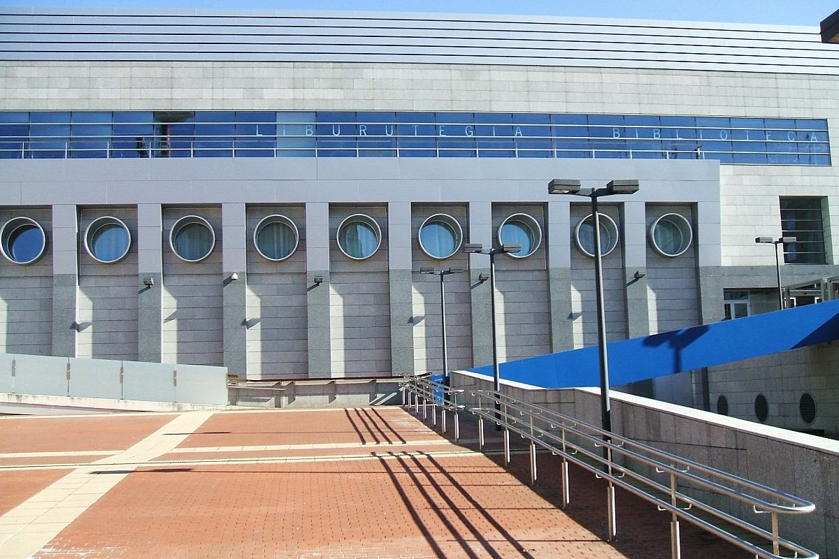 Museo Artium, Vitoria-Gasteiz